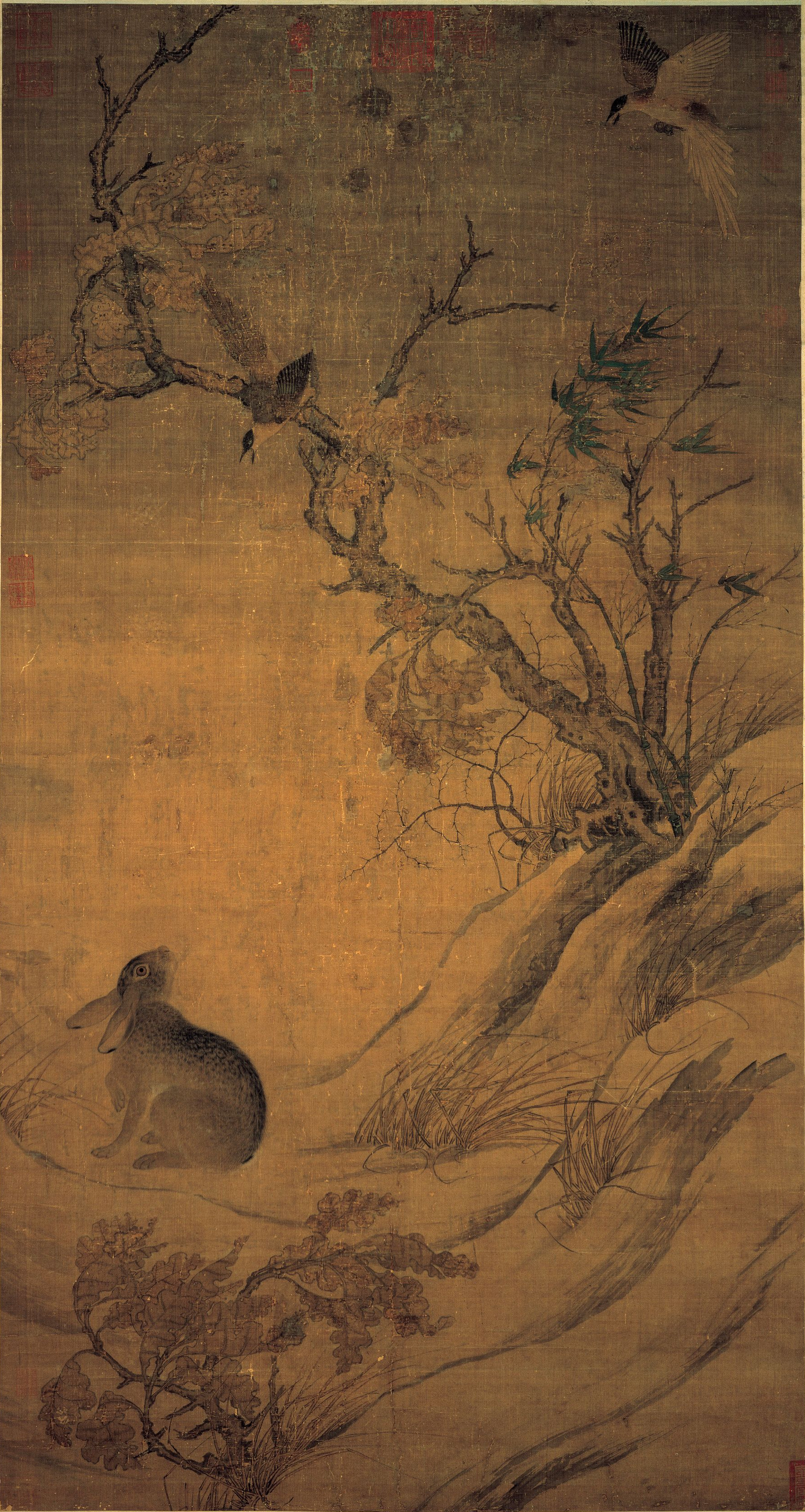 Hase und zwei Eichelhäher, Tusche auf Seide